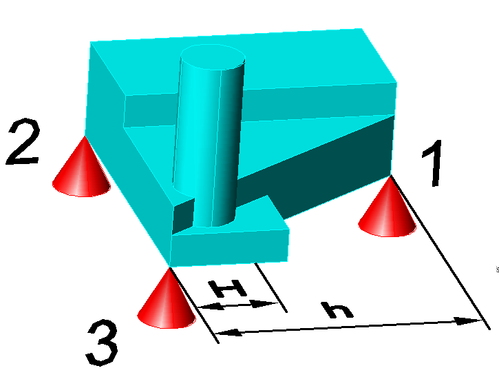 Merev test tömegközéppontjának meghatározása mérlegek segítségével. Készült Autodesk AutoCAD és Adobe Photoshop szoftverekkel.